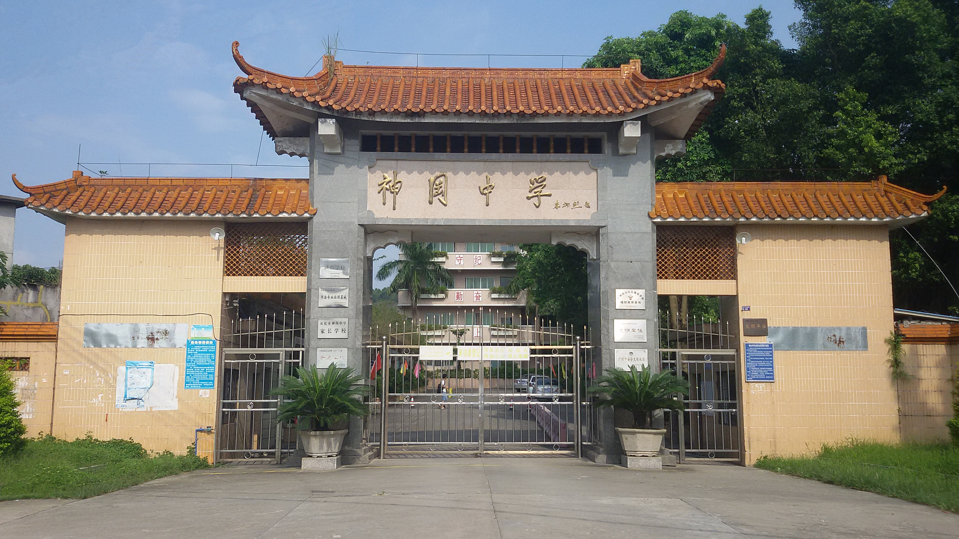 粵語: 從化神岡中學大門